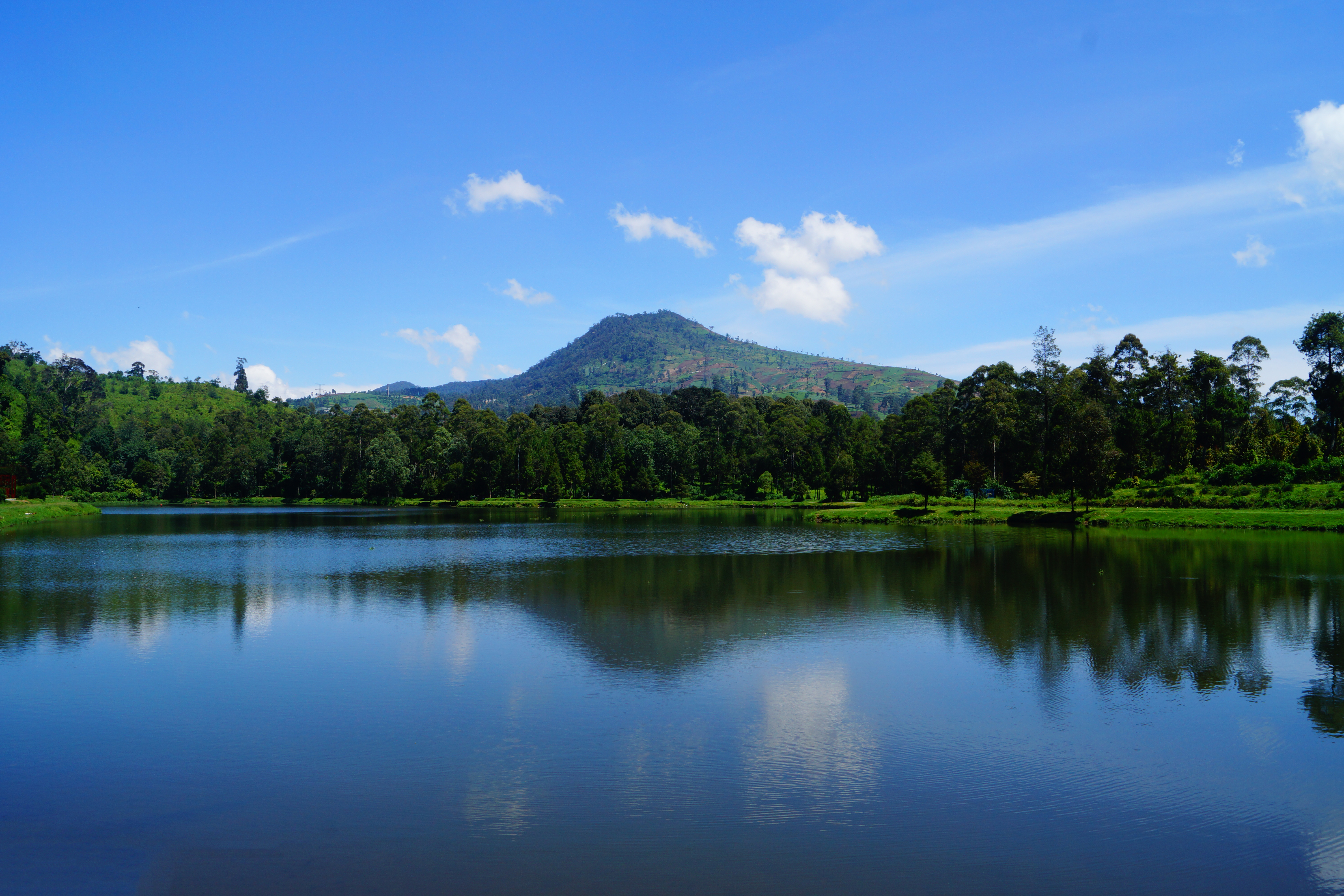 Pemandangan gunung dari kawasan nol km sungai citarum yang berada di Situ Cisanti